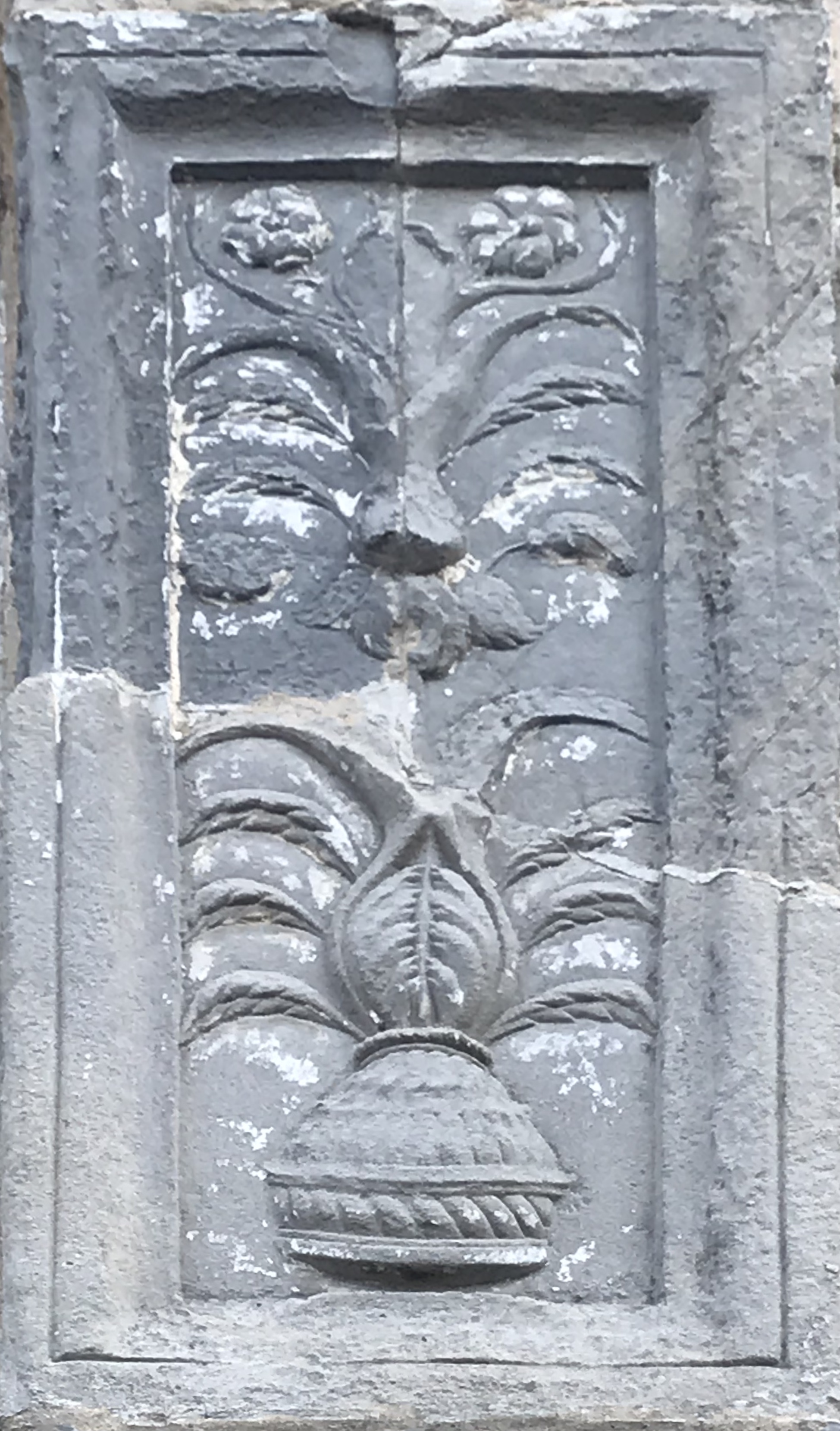 Chiesa di Santa Maria del Soccorso a Caccuri